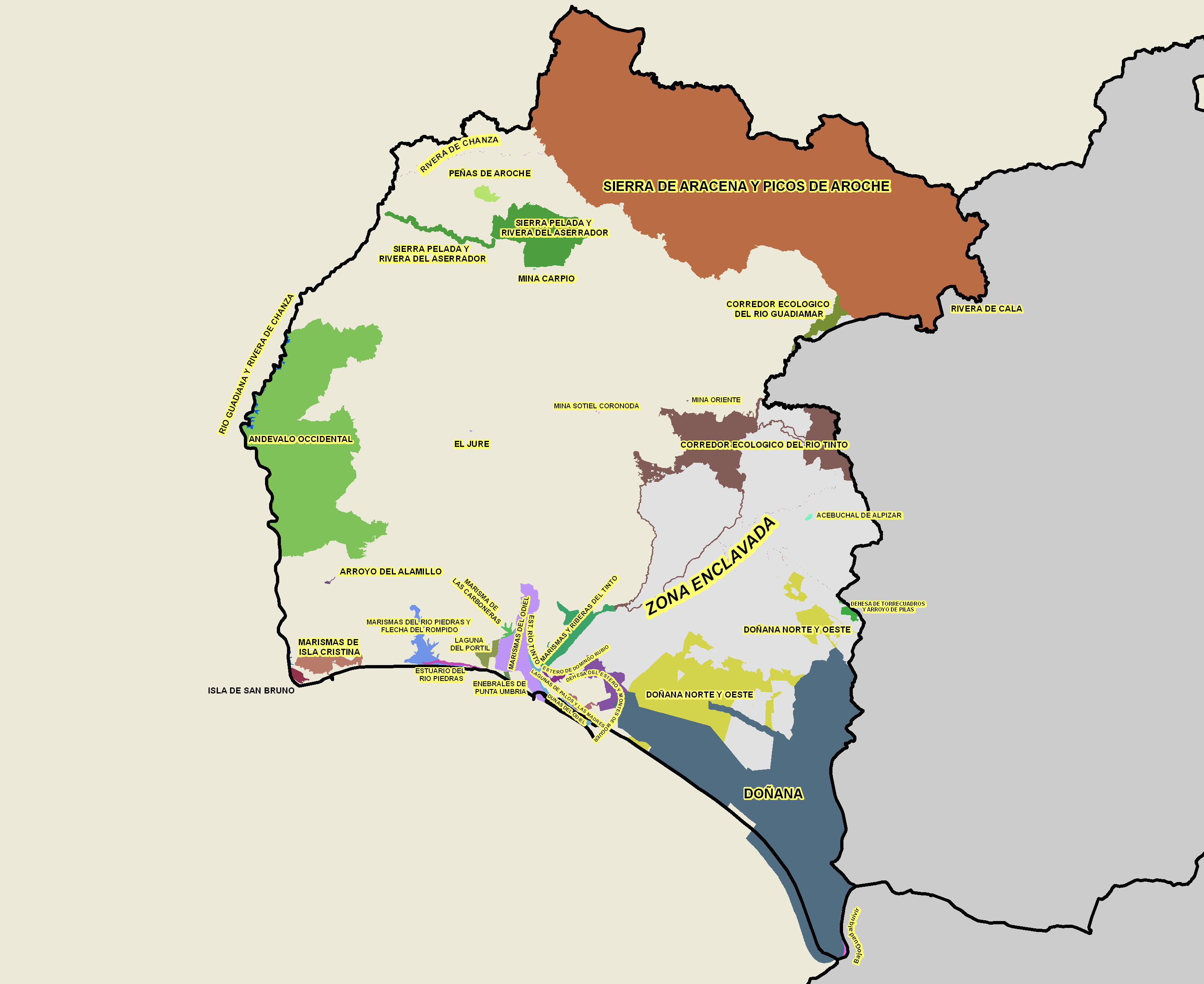 Zonas protegidas por la Red Natura 2000 en la Provincia de Huelva